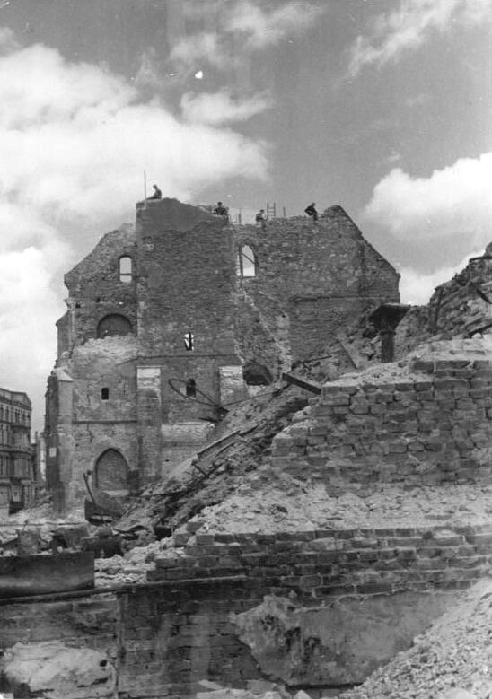 Magdeburg, Heilig-Geist-Kirche, Ruine Illus Biscan Oktober 50 Die Tatsachen widerlegen ein Gerücht! Wiederaufbau der von anglo-amerikanischen Bomben zerstörten Heilige-Geist-Kirche in Magdeburg 1948 begann man, bei der von anglo-amerikanischen Bomben schwer beschädigten Heilige-Geist-Kirche die Trümmer zu beseitigen und überhängendes und baufälliges Mauerwerk zu sprengen. Gerüchtemacher behaupteten dagegen, die Kirche würde abgetragen. In Wahrheit wurde ihr Wiederaufbau betrieben. UBz: Aufnahme vor etwa 2 Jahren. Leihweise ILLUS Berlin W8